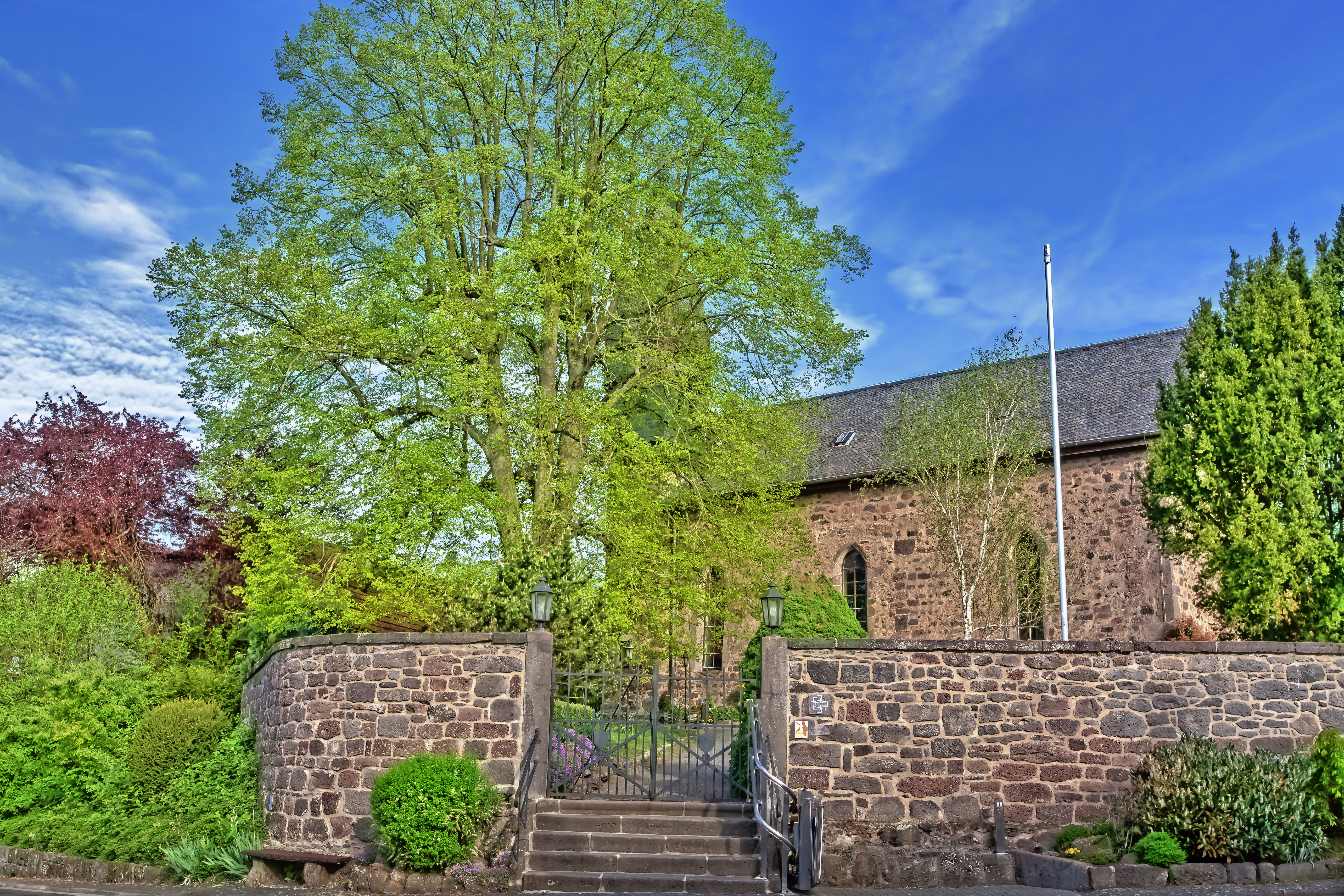 Evabgelische Kirche Burkhardsfelden